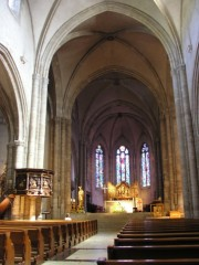 nef de la cathédrale